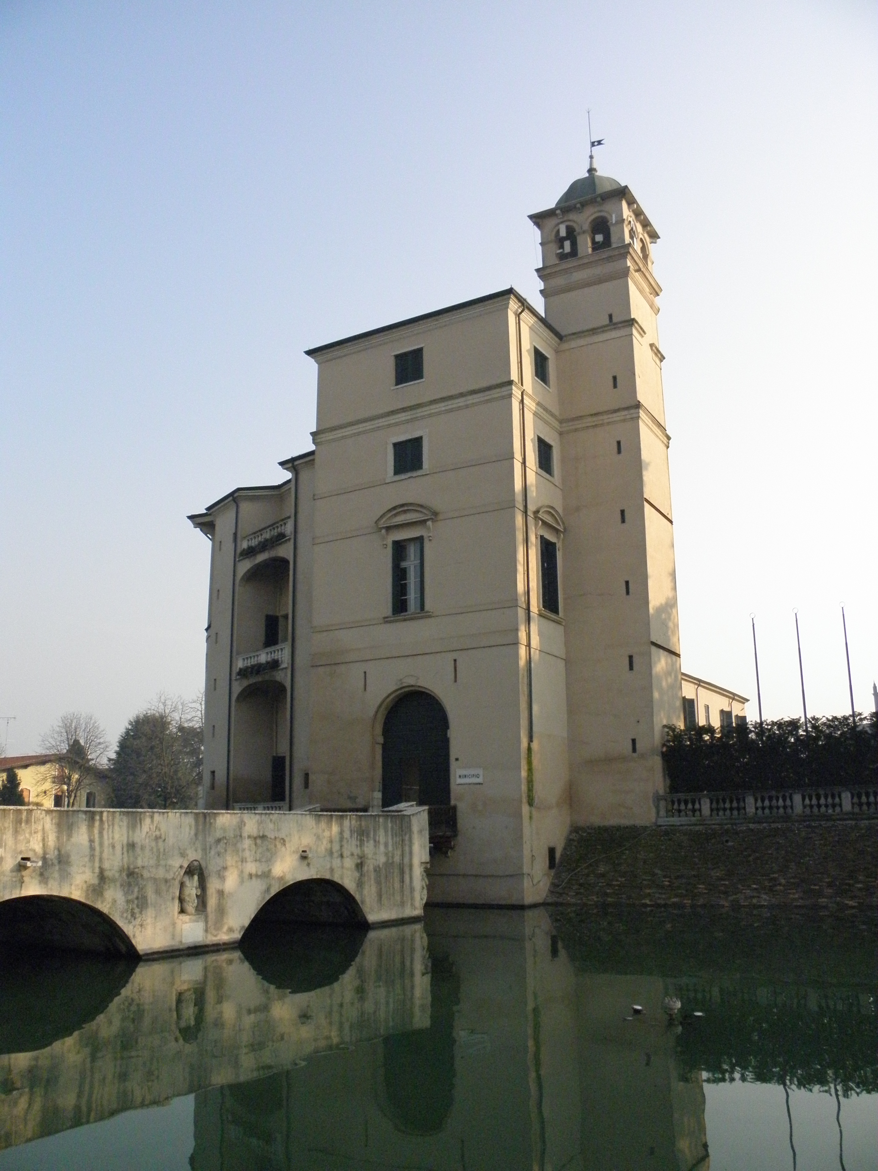 Villa Sagramoso, detta anche "Il castello", ora sede municipale di Zevio, provincia di Verona.